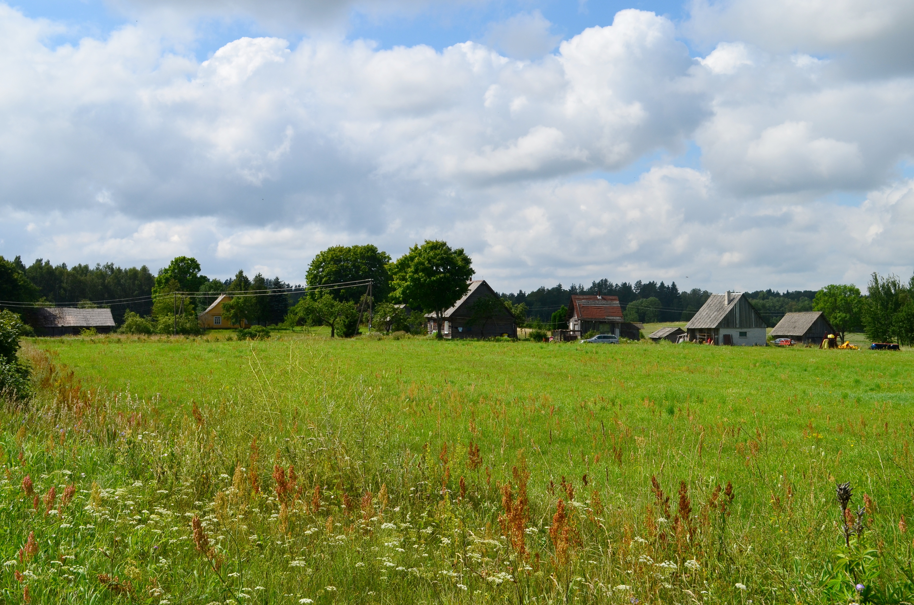 Pūčkoriškių k., Utenos raj.